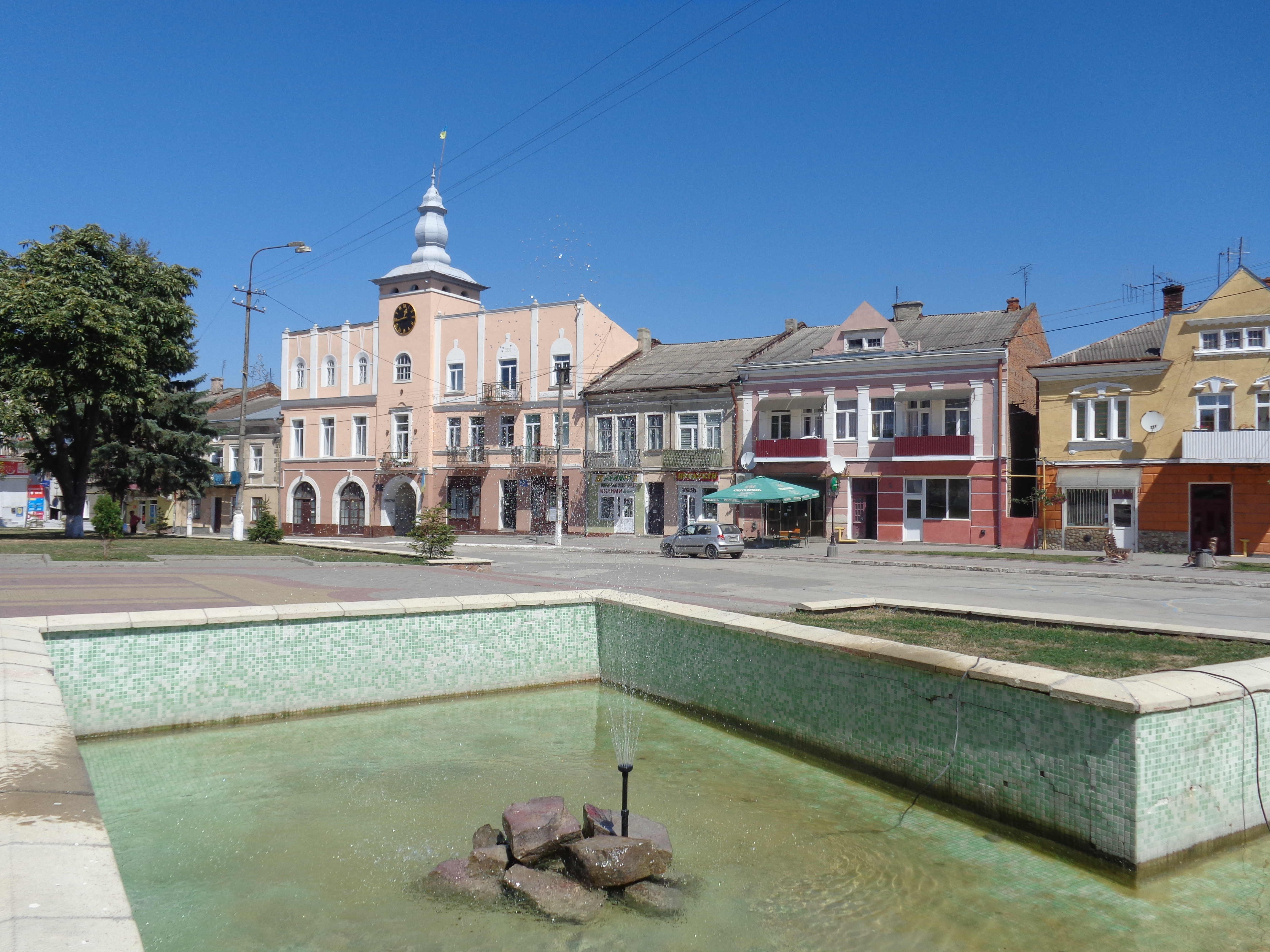 Центральна частина Підгайців.